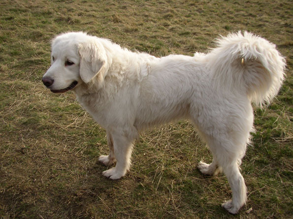 Tatrahund